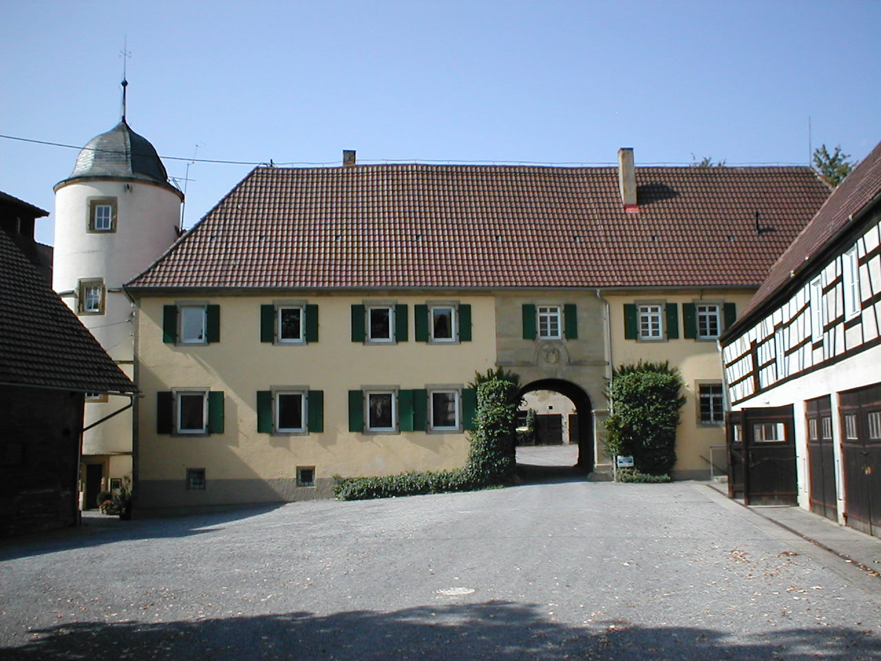 Vorhof der Meierei beim Oberen Schloss in Bonfeld, erbaut um 1783. Das Hauptgebäude befindet sich hinter dem hier gezeigten Torgebäude, der so genannte Wasserturm (links im Bild) geht noch auf die vorherige Schlossanlage aus dem 16. Jhd. und möglicherweise sogar auf deren Vorgängerbau, eine mittelalterliche Wasserburg, zurück.